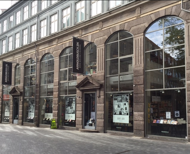 Arnold Busck i Købmagergade, København